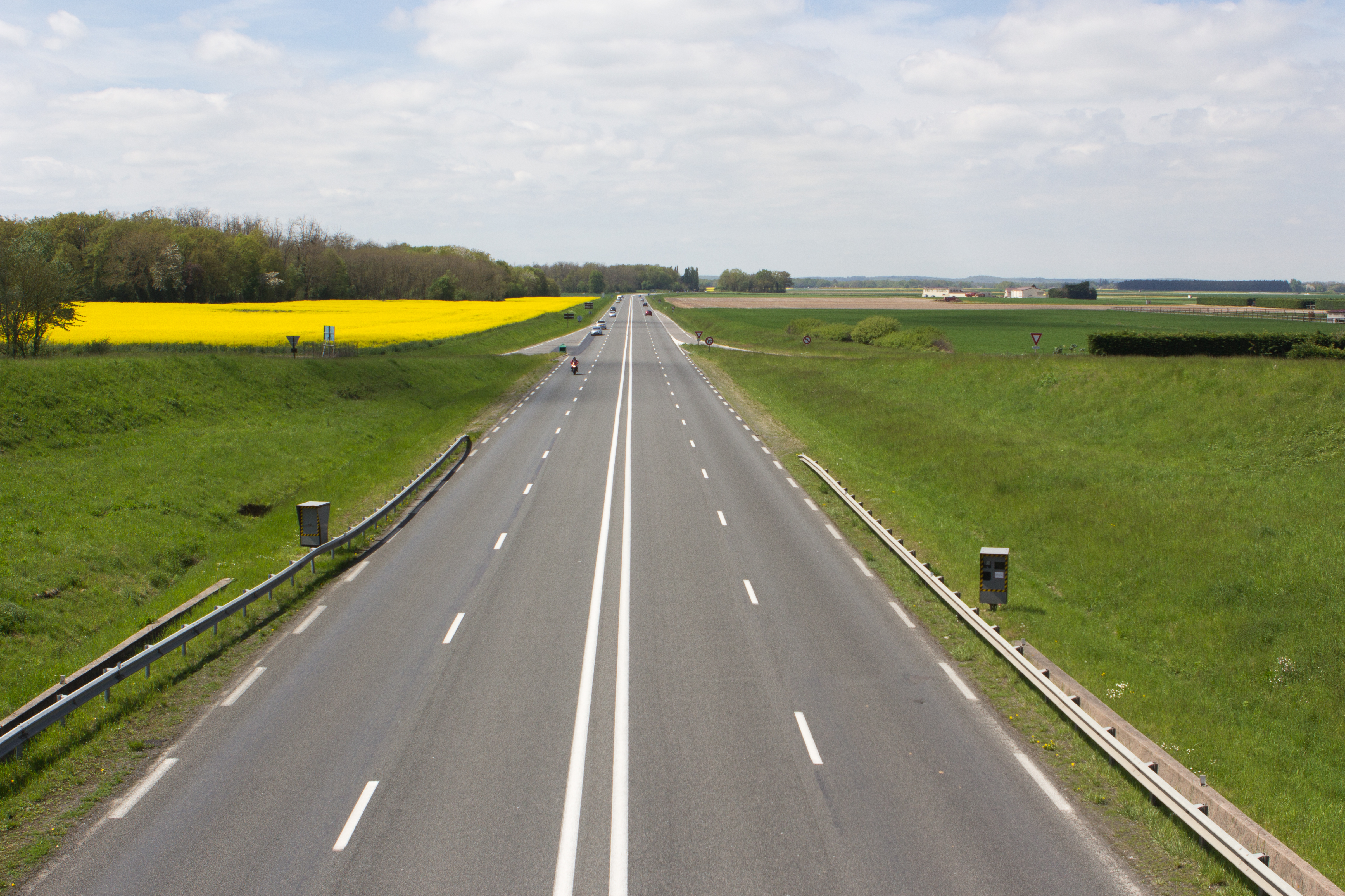 RD637 à Chailly-en-Bière (Commune de Chailly-en-Bière, Seine-et-Marne, France)